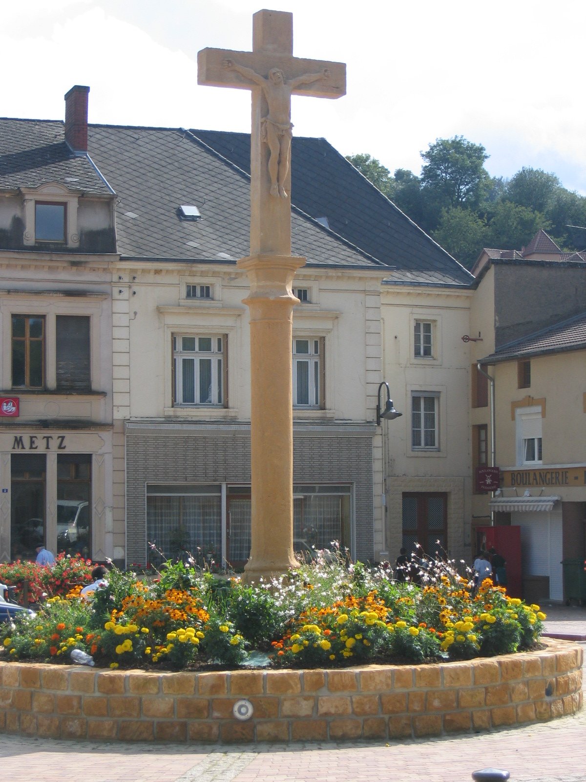 Le Grand Calvaire de la place de la République